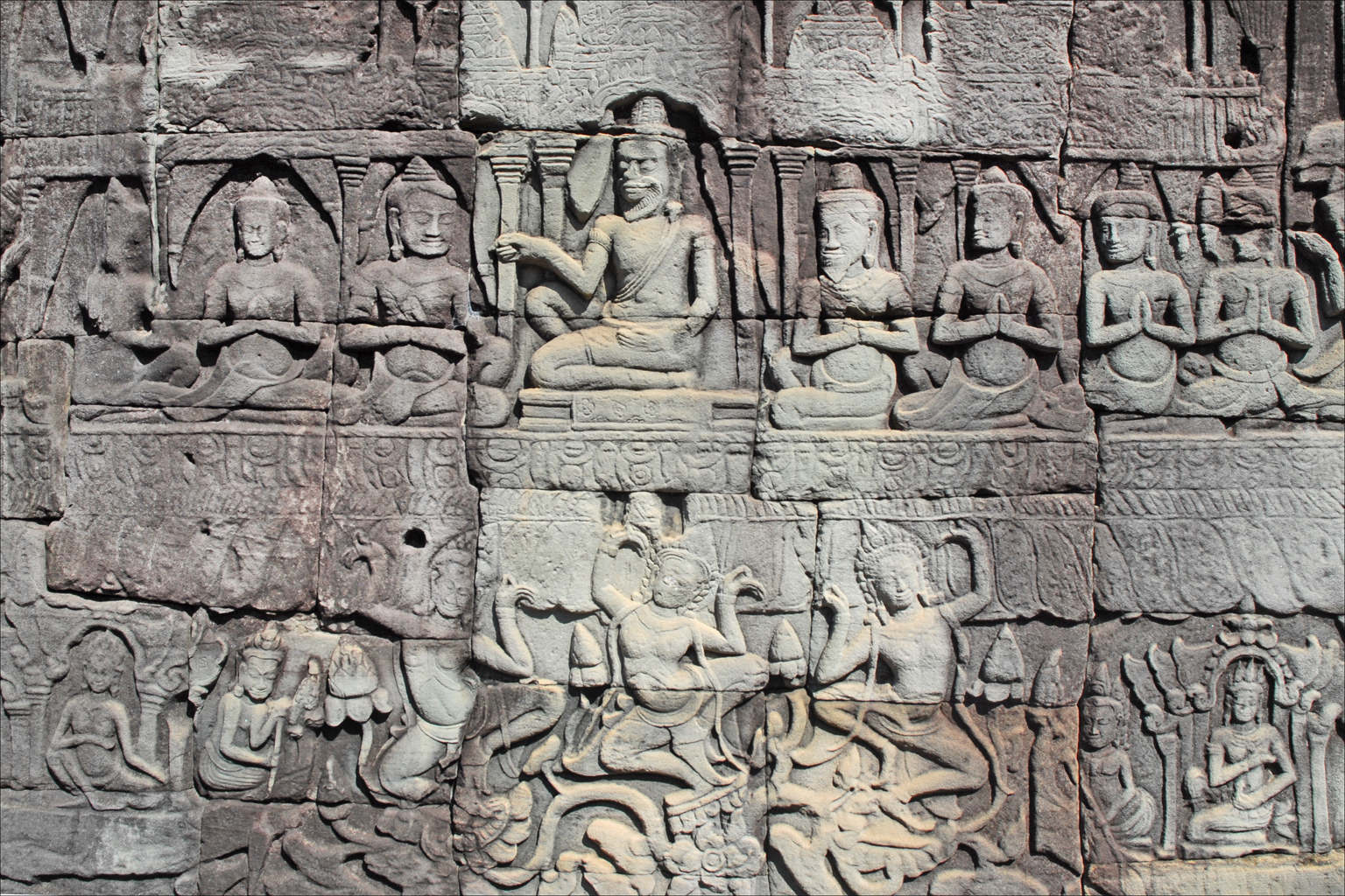 Shiva avec des ermites ou des ascètes, bas-relief sur les murs du Bayon Au registre inférieur, des apsaras sont représentées Galerie intérieure sud _________________ Le Bayon est le temple-montagne du roi khmer : Jayavarman VII (1181-1218), le vainqueur des Chams et le plus grand constructeur des rois khmers. La construction du Bayon a commencé vers 1195. Ce temple est célèbre pour ses 54 tours décorées par 4 visages. Comme temple d'Etat, il était au centre d'Angkor Thom, la capitale du royaume. C'est un temple "œcuménique " qui associe l'hindouisme (les dieux Shiva et Vishnu y sont largement présents) et le bouddhisme car le Roi était lui-même bouddhiste du grand véhicule : Mahâyâna. Le Roi et la famille royale étaient représentés dans le Bayon sous forme de bouddhas dans les chapelles entourant la grande tour centrale.